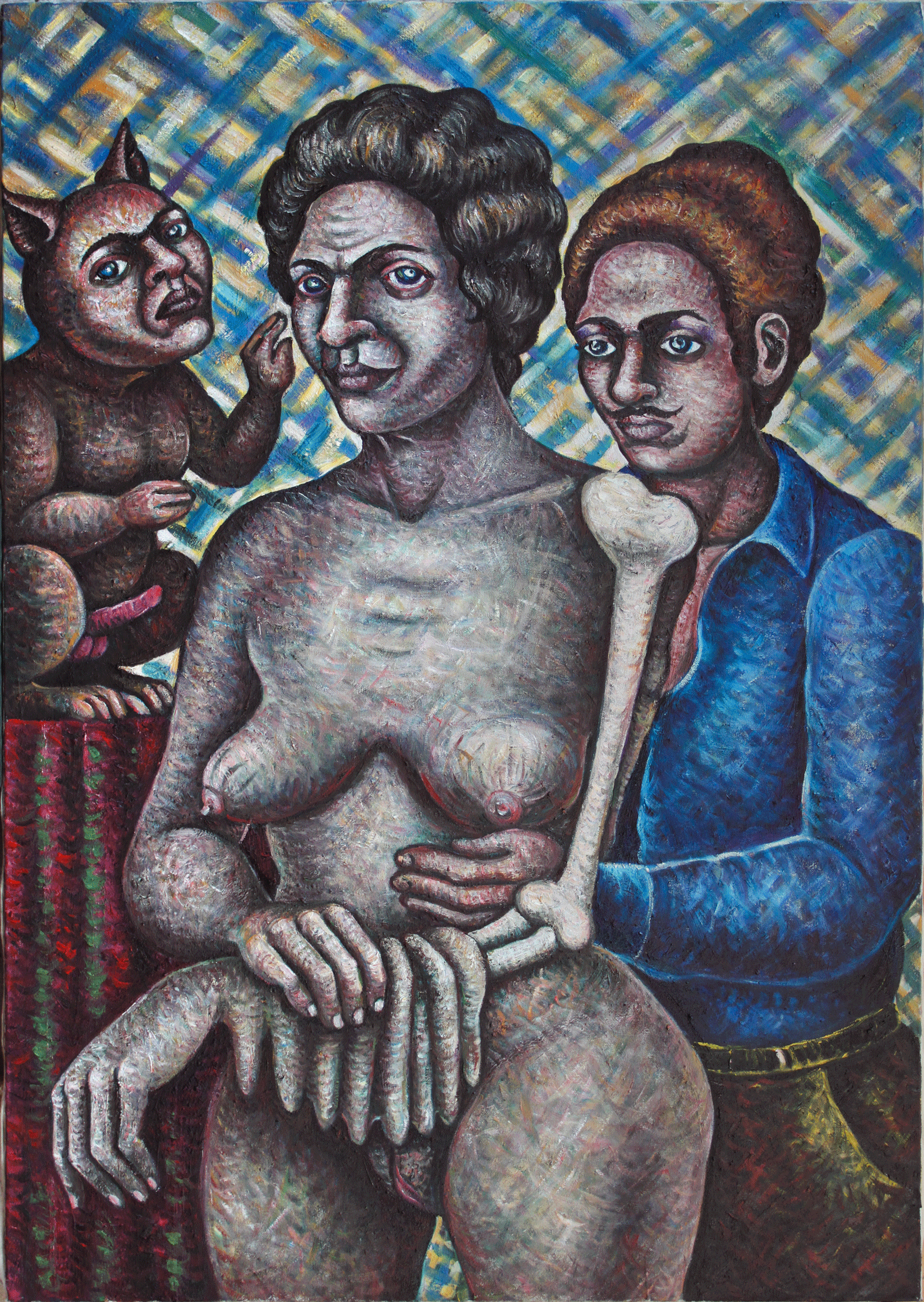 peinture